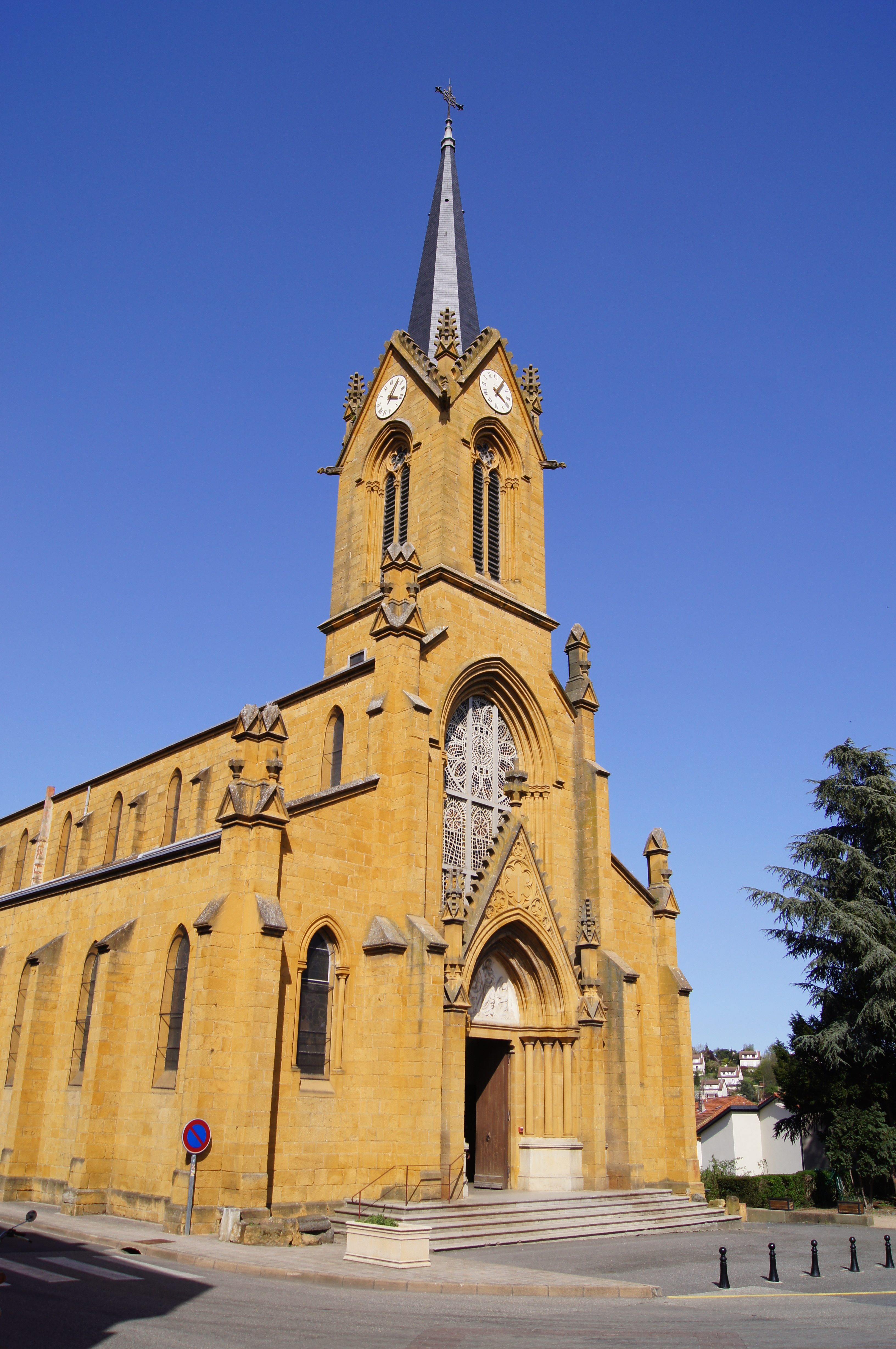 Eglise de Savigny Rhône